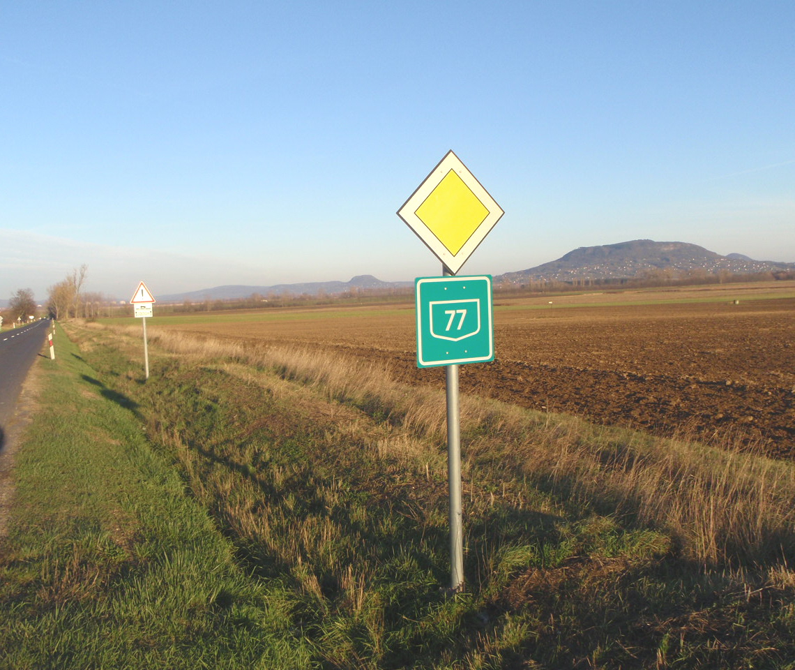 77-es főút vége Lesencetomaj 84-es számú főútnál